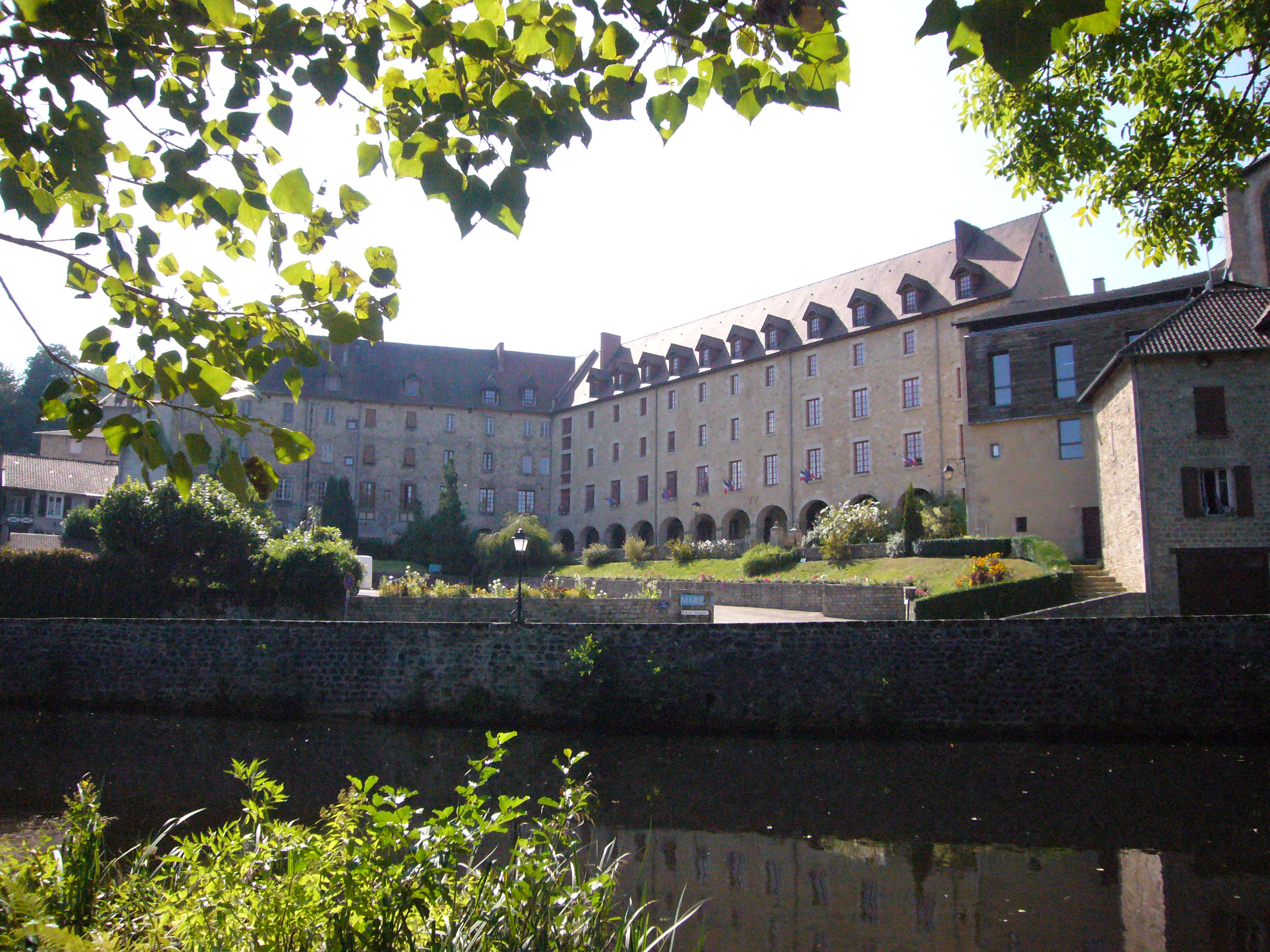 Mairie d'Eymoutiers (Haute-Vienne, France)